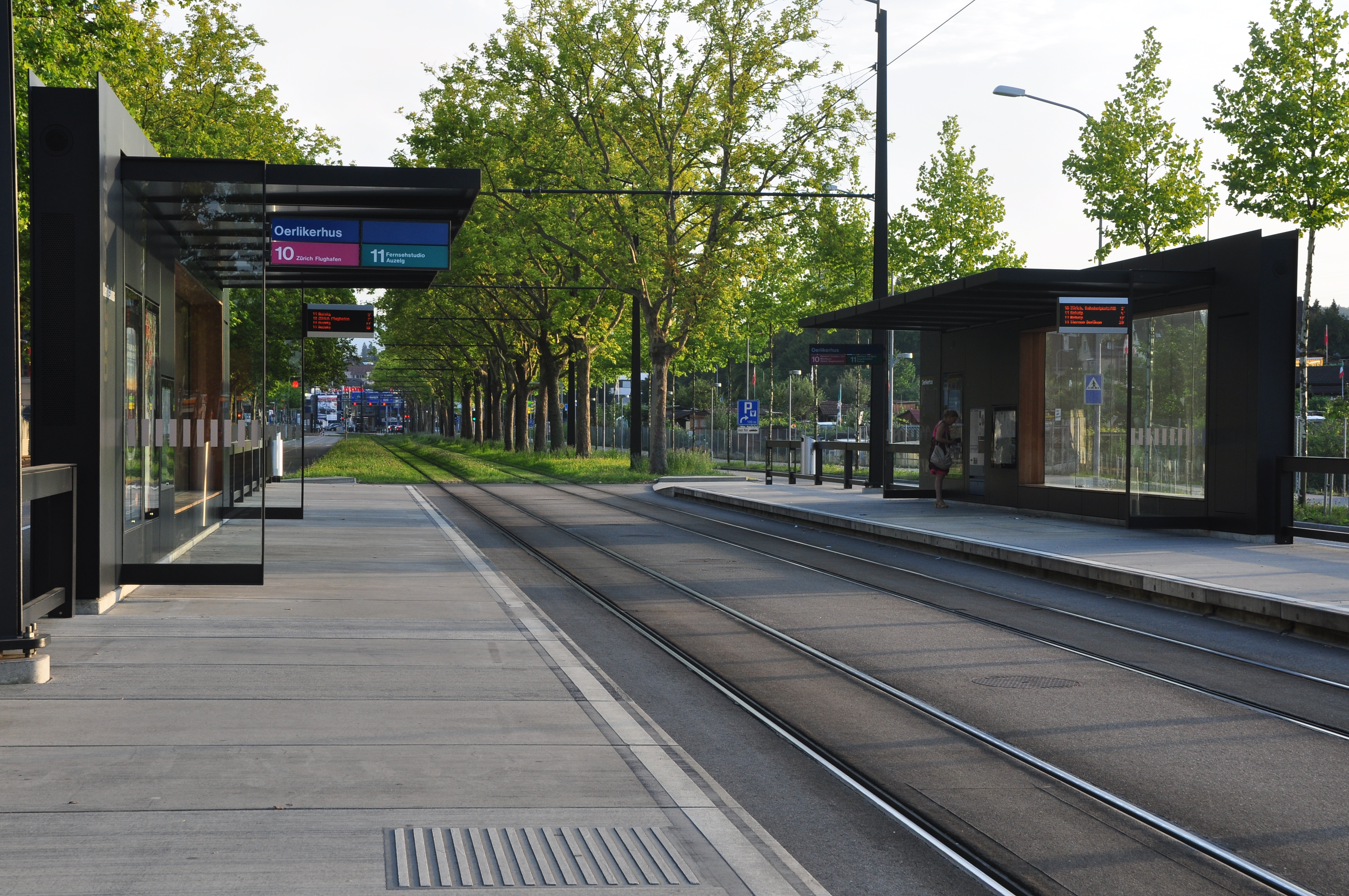 Glattalbahn, Oerlikerhus in Zürich-Oerlikon (Switzerland)